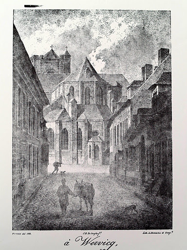 Gravure door Vermote. Zicht op de Sint Medarduskerk in 1813